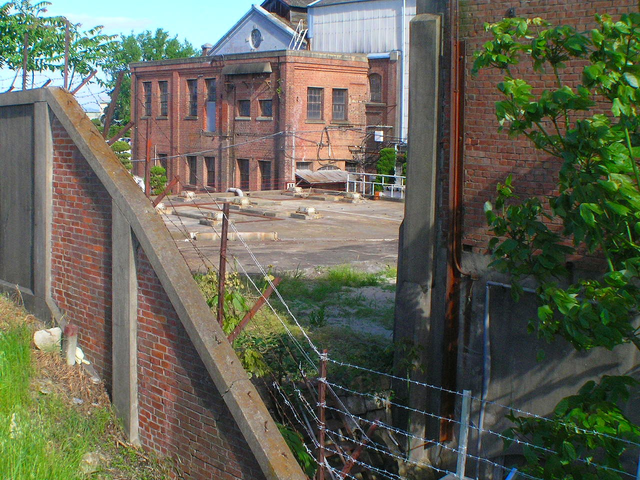 日本毛織株式会社加古川事業所